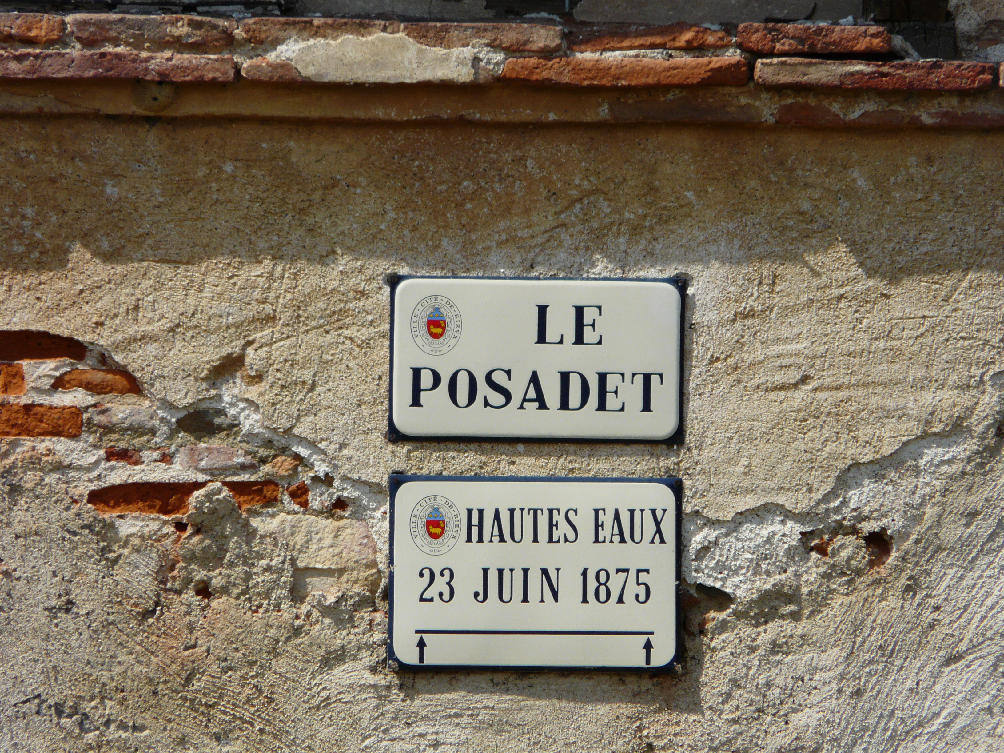 Témoin de la crue du 23 juin 1875 apposé sur le mur d'une maison située rue d'Auriac, en bordure de l'Arize, Rieux-Volvestre, Haute-Garonne, France.